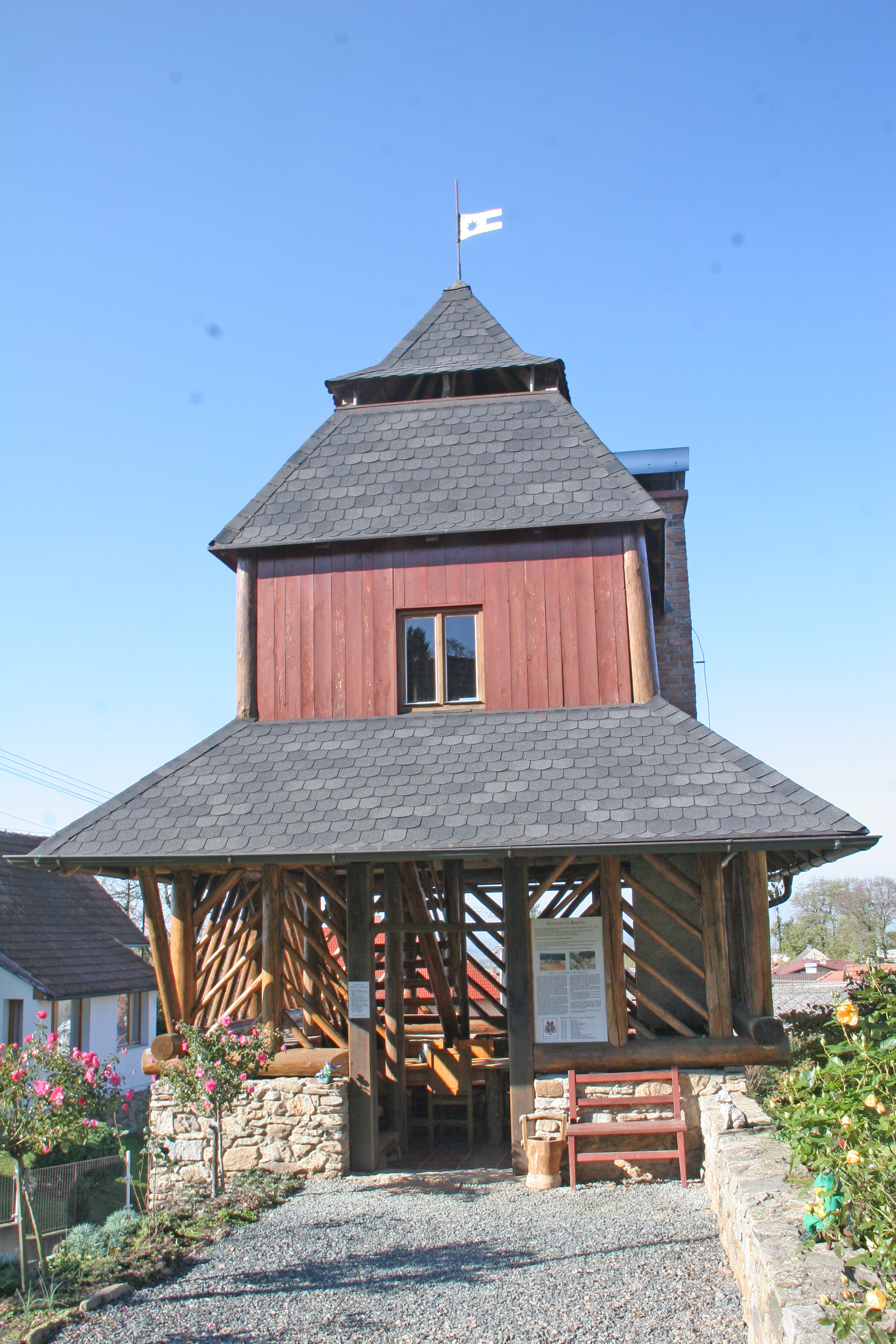 Licoměřice rozhledna1